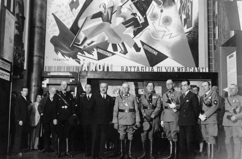 Karl Eduard von Sachsen-Coburg und Gotha Les Allemands dans une salle de La Montre de la Revolution Fasciste, pendant la visite. [Die Deutschen während ihres Besuchs im Saal "de La Montre de la Revolution Fasciste".] Abgebildete Personen: Sachsen-Coburg und Gotha, Karl-Eduard von: 1884-1954, Herzog, Präsident des Deutschen Roten Kreuzes, Deutschland